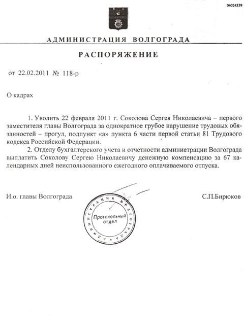 Распоряжение и.о. главы Волгограда «О кадрах» от 22 февраля 2011 года № 118-р